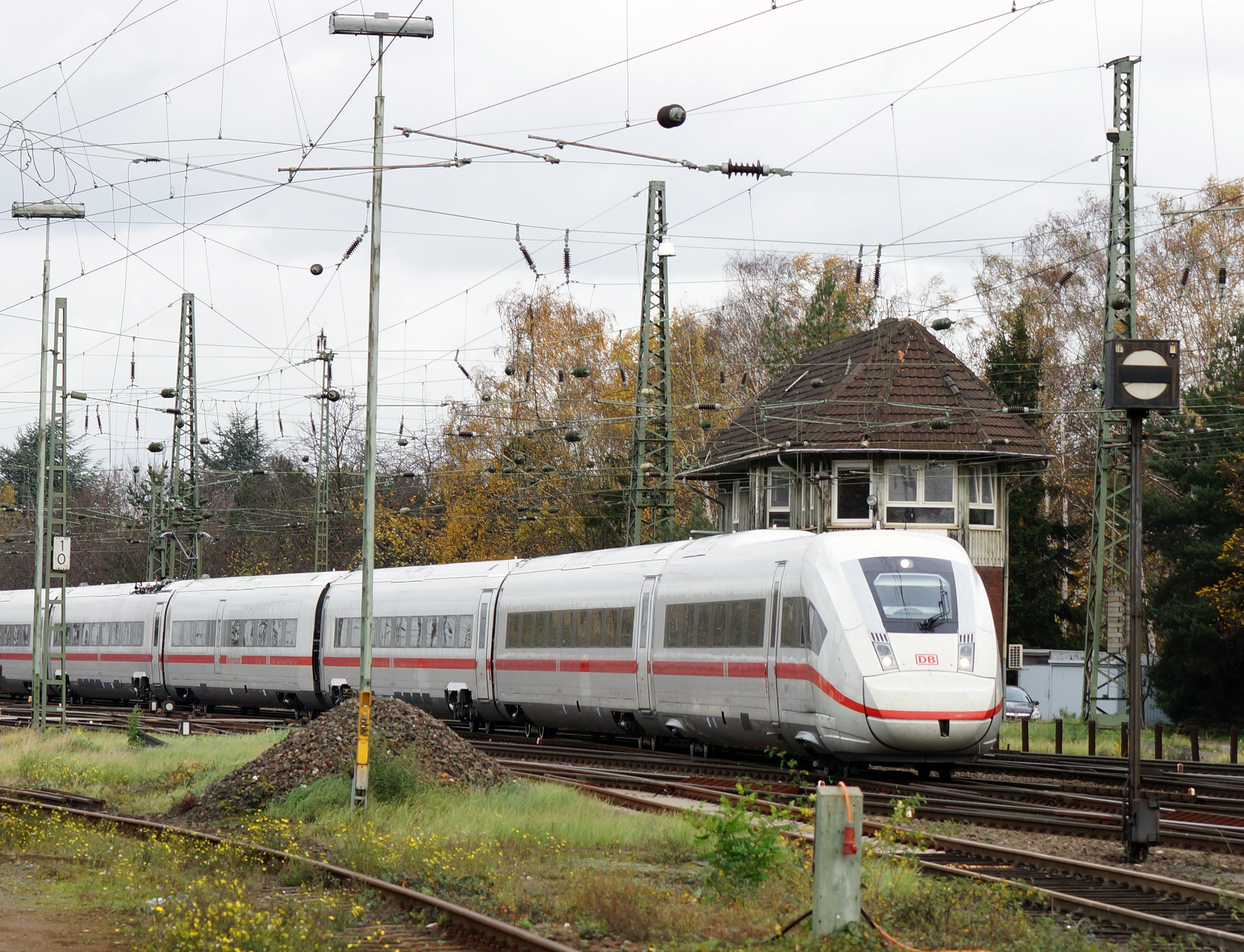 ICE 4 der DBAG (412 002) auf Probefahrt in der Nähe des Rangierbahnhofs Köln-Kalk Nord.